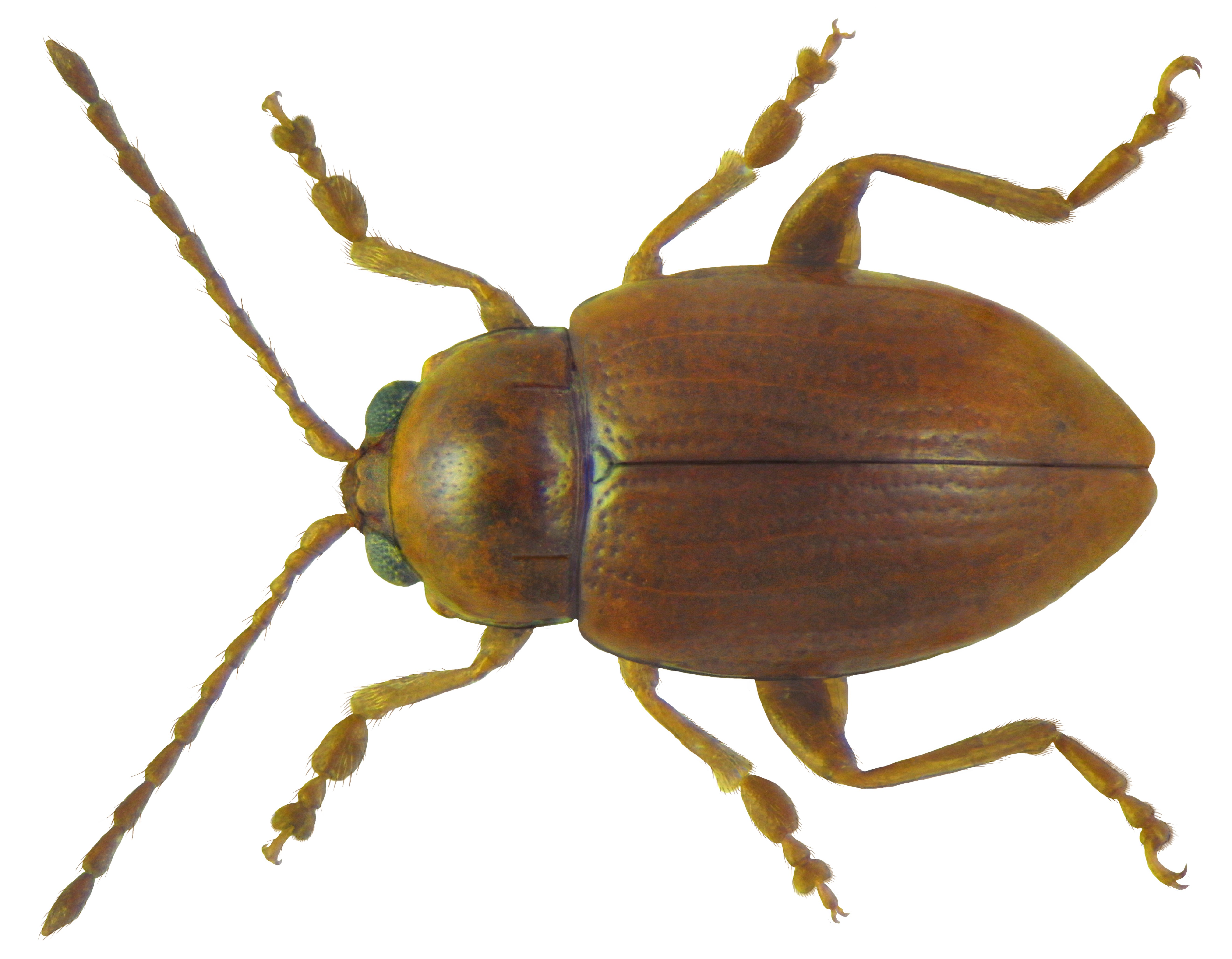 Neocrepidodera ferruginea (Scopoli, 1763) male Syn. Crepidodera ferruginea (Scopoli, 1763); Asiorestia ferruginea (Scopoli, 1763) Familie: Chrysomelidae Groesse: 2,9 mm (2,4-4 mm) Verbreitung: Europa Ökologie: oligophag auf Poaceae Fundort: Germania, Bayern, Oberfranken, Selbitz leg.det. U.Schmidt, 1972 Photo: U.Schmidt, 2011